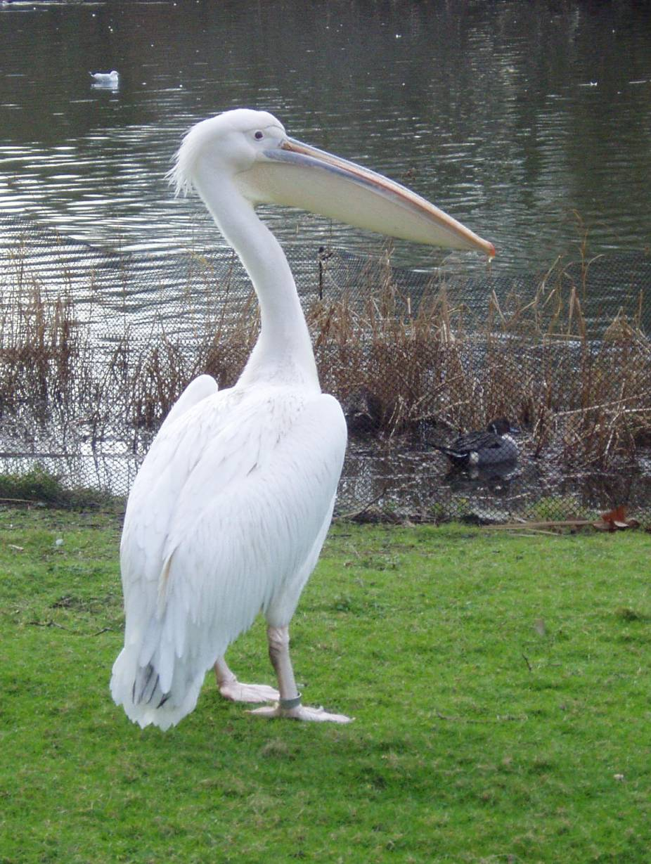 Pelecanus onocrotalus